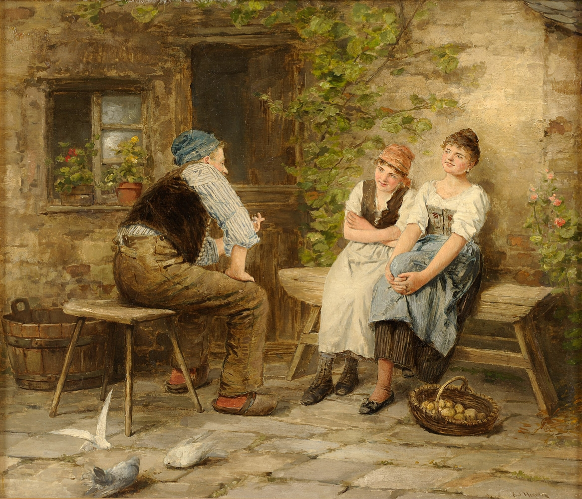 Eine interessante Geschichte. Signiert. Öl auf Leinwand, 42 x 50 cm